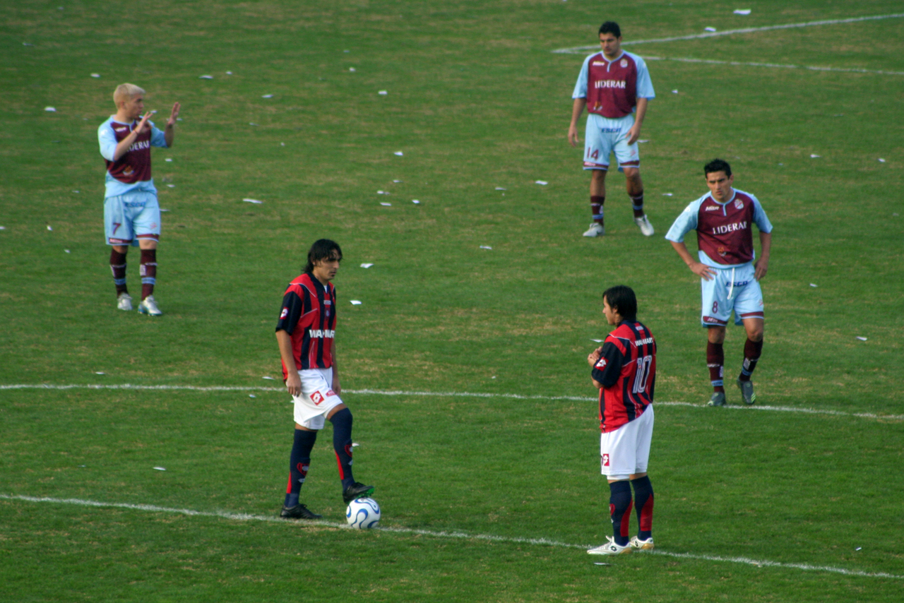 San Lorenzo